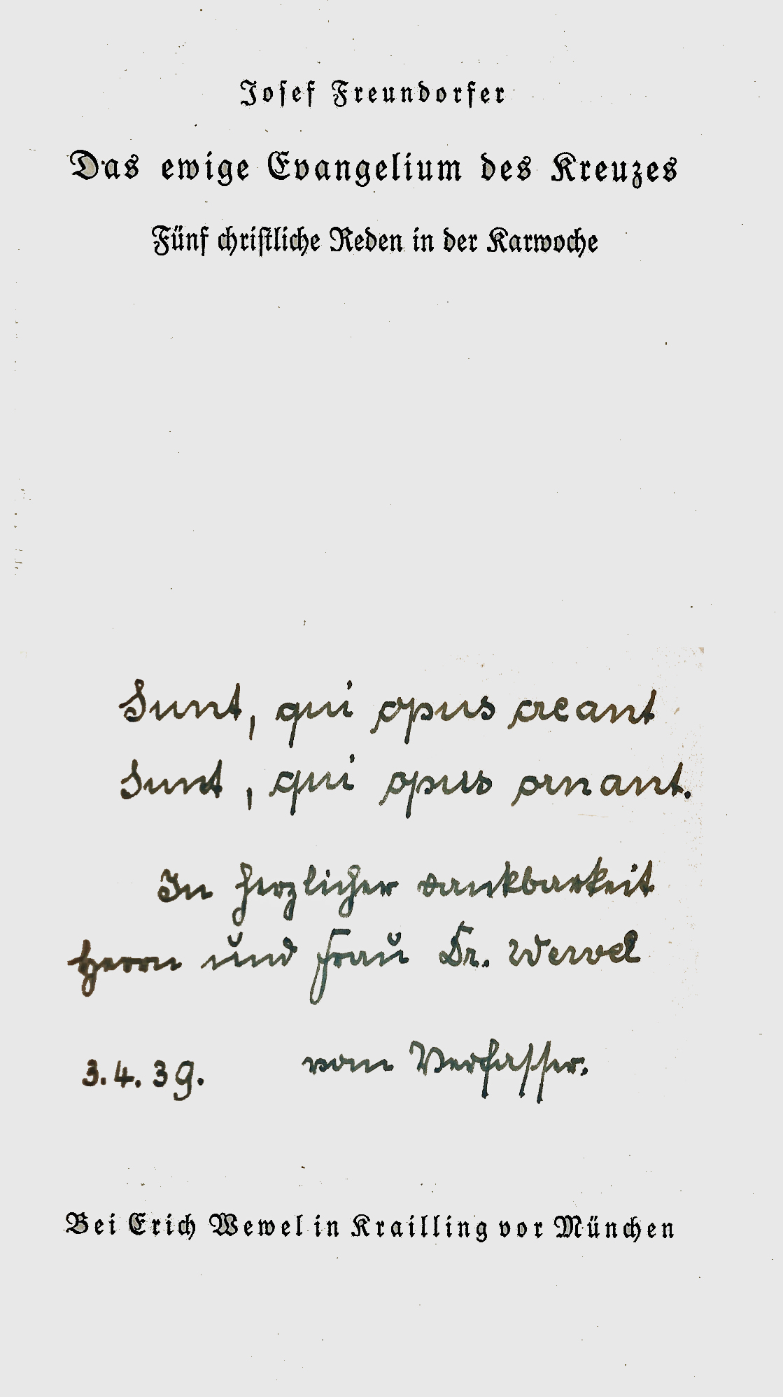 Joseph Freundorfer widmet sein Buch "Das ewige Evangelum des Kreuzes" meinem Vater Erich Wewel, in dessen Verlag es 1939 eines der ersten Bücher war.